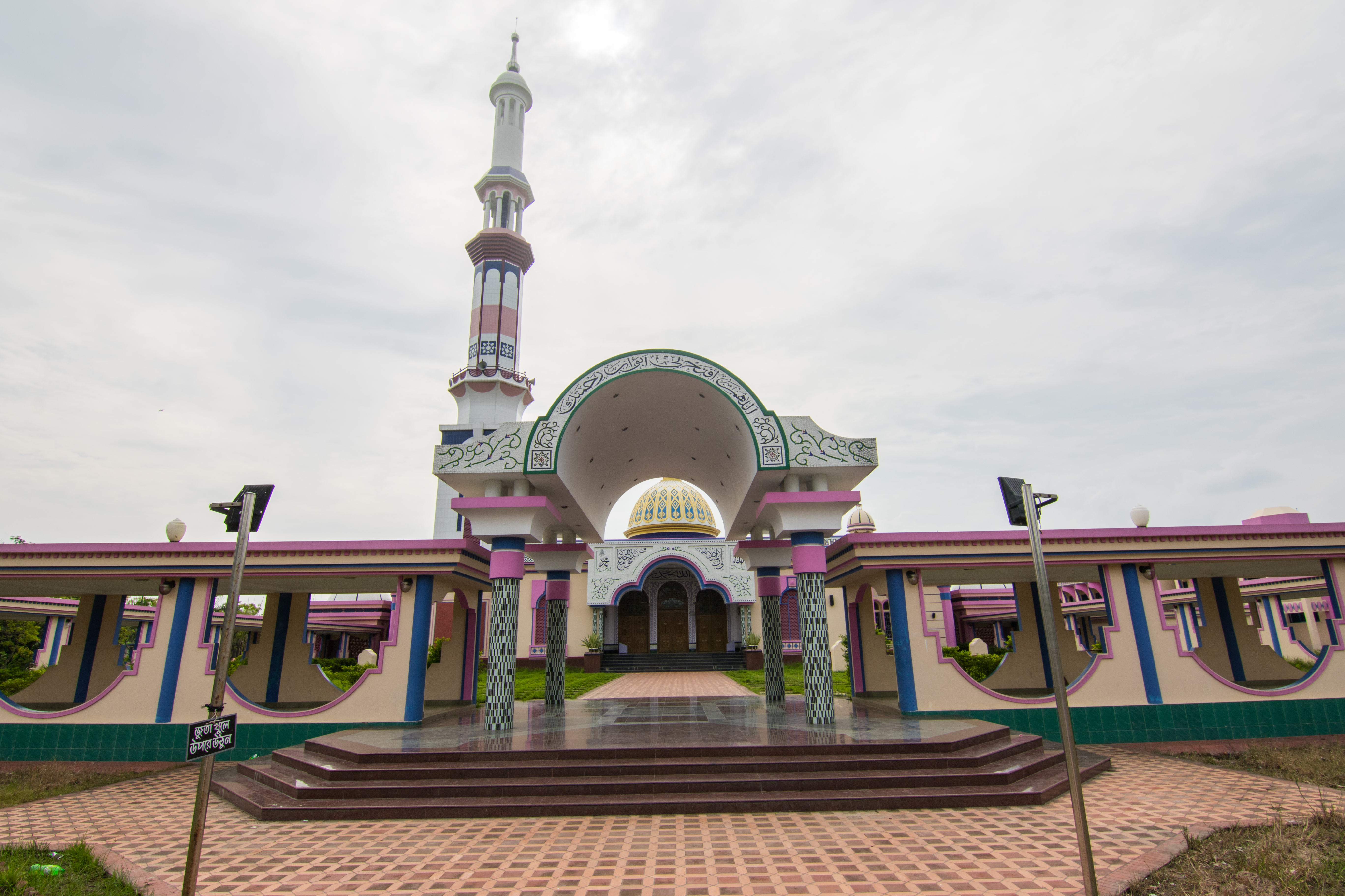 বাইতুল আমান জামে মসজিদ